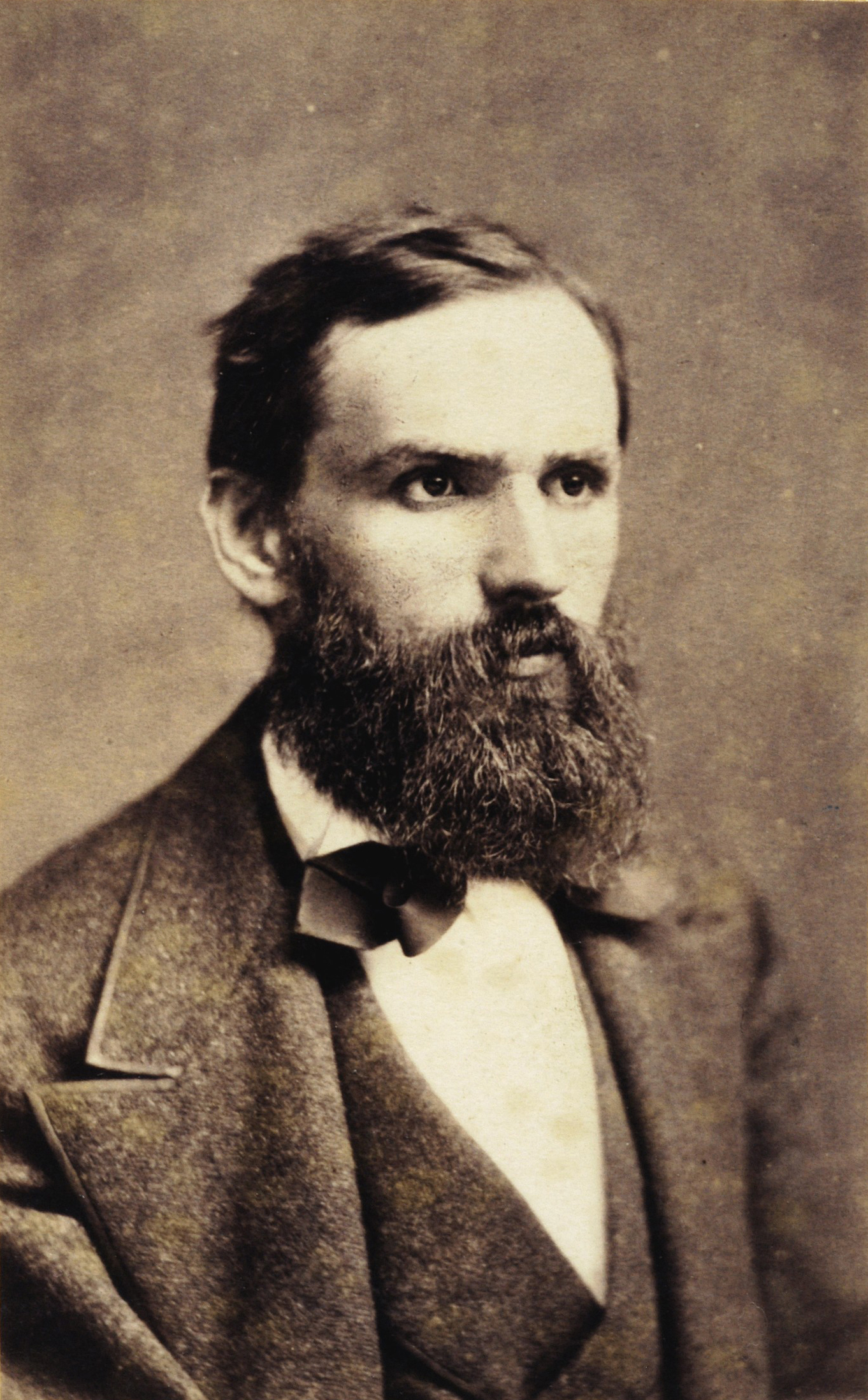 Karol Estreicher (1827-1908). Zdjęcie ze zbiorów Biblioteki Narodowej, F.6789, bez ramki